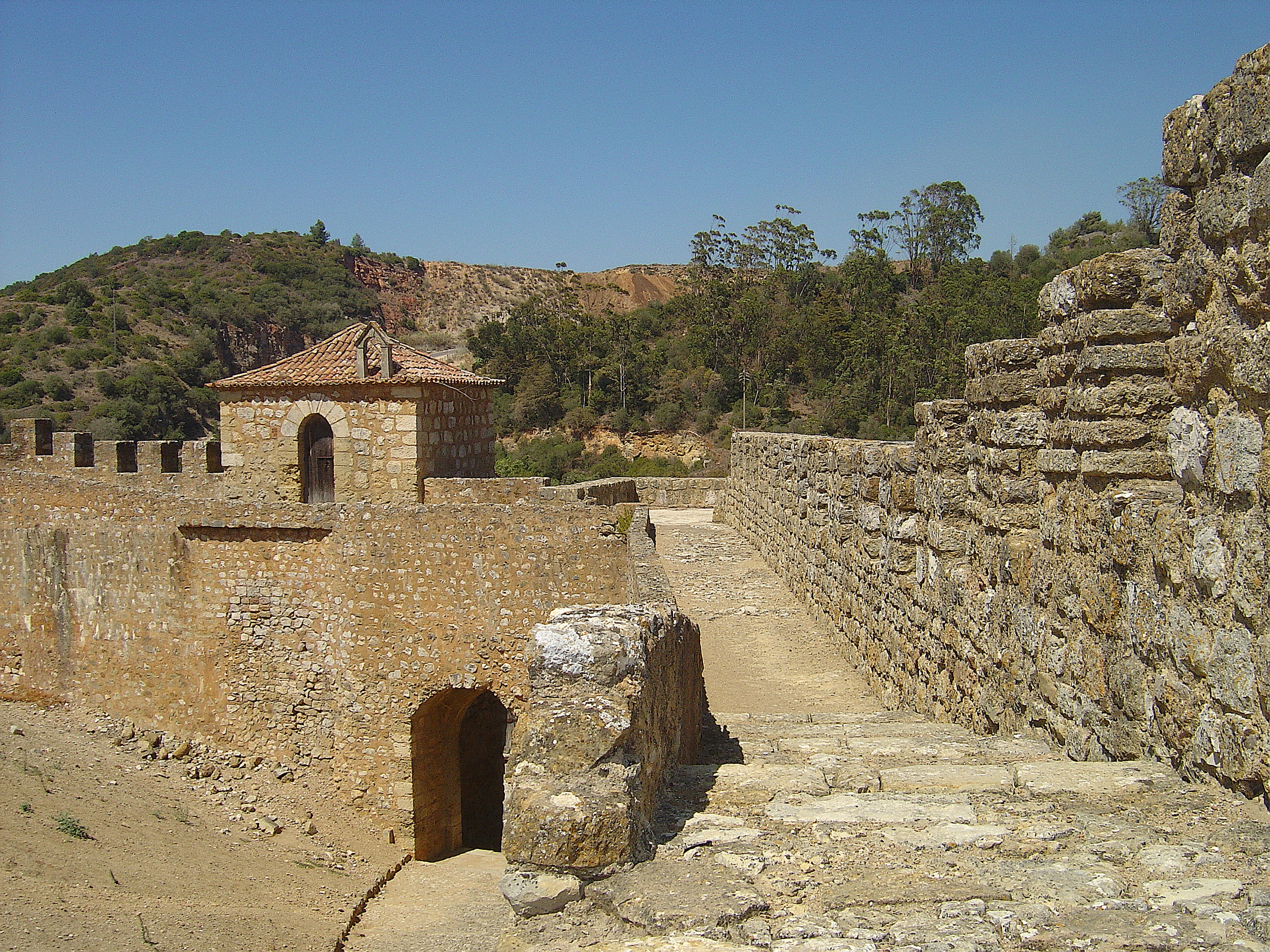 Castelo de Alenquer ( Portugal )